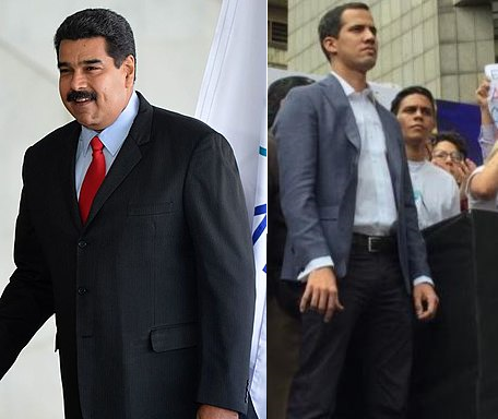 马杜罗和瓜伊多